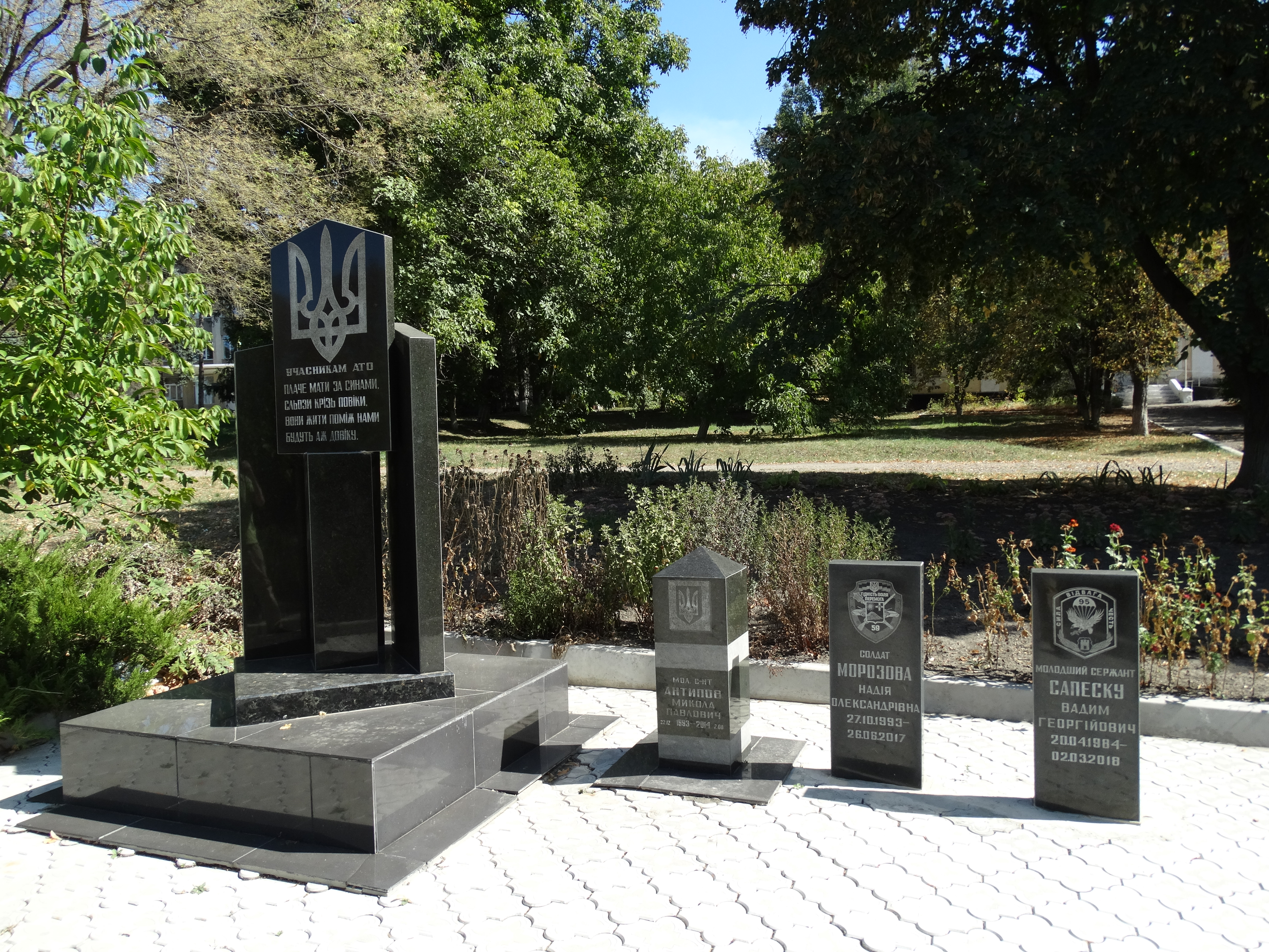 Вікіекспедиція на північ Одещини